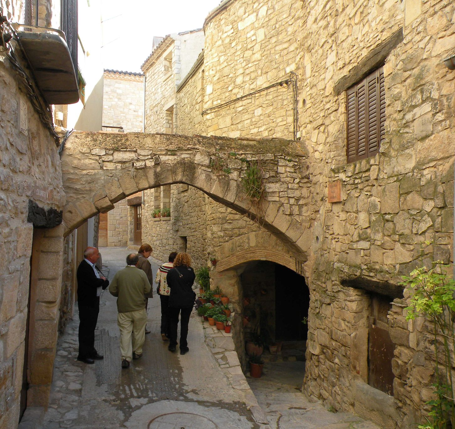 Nucli antic de Guimerà